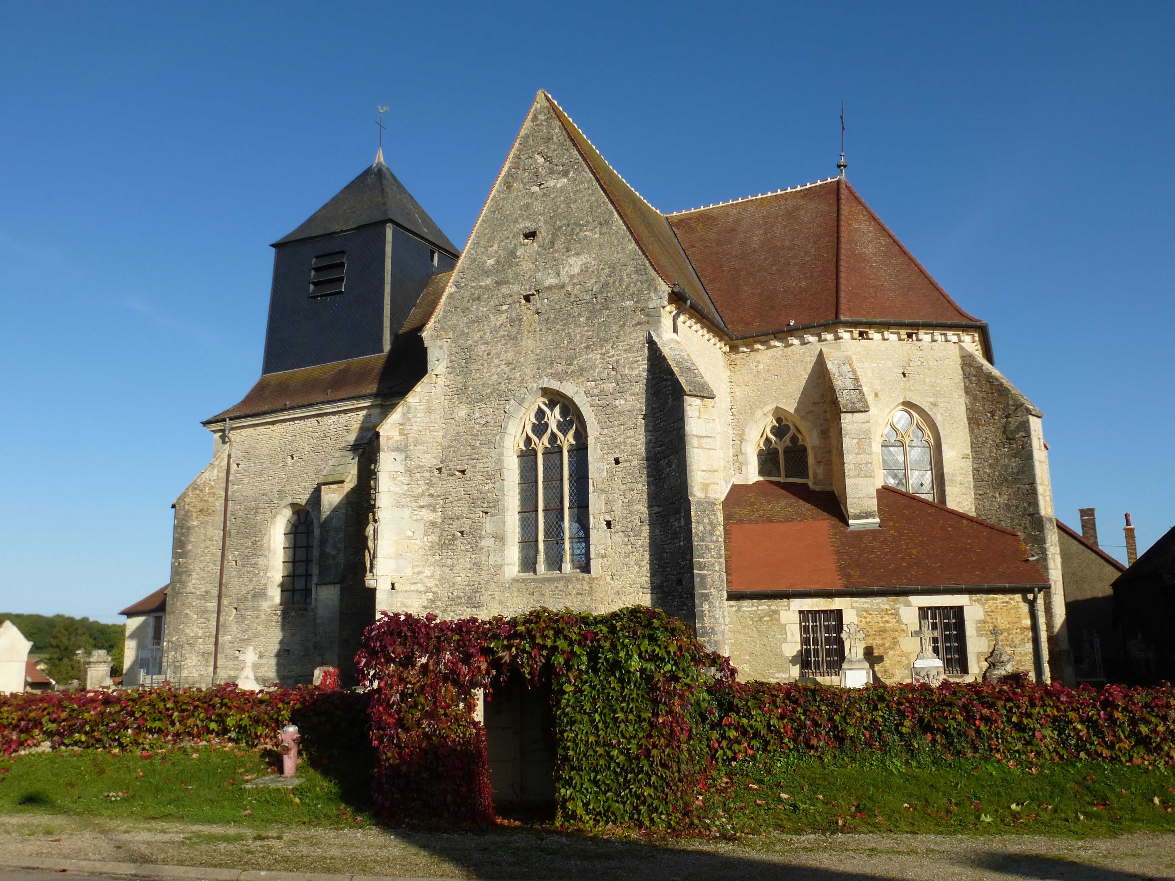 Eglise de Praslin 16-18eme siècle